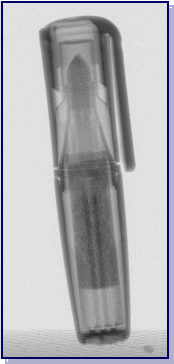 immagine in radioscopia di un evidenziatore